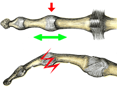 Beispielunfallmechanismus